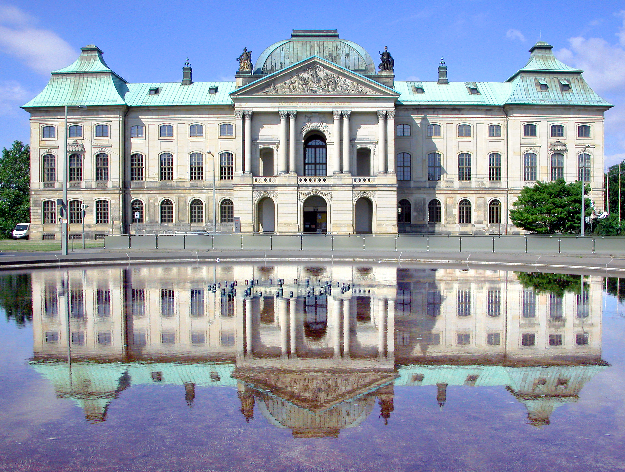 29.06.2008 01097 Dresden-Innere Neustadt, Palaisplatz: Japanisches Palais (GMP: 51.059854,13.737701). Heutiger Bau 1727-1733, Matthäus Pöppelmann. Sicht vom Palaisplatz. [DSCN33249.TIF]20080629015DR.JPG(c)Blobelt